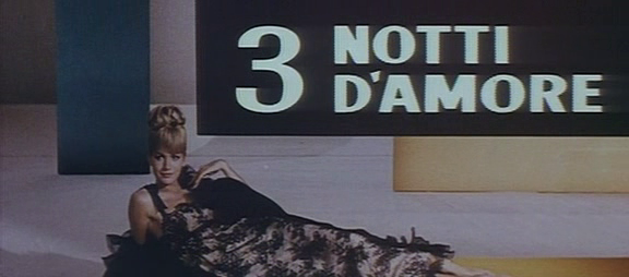 Scena del film